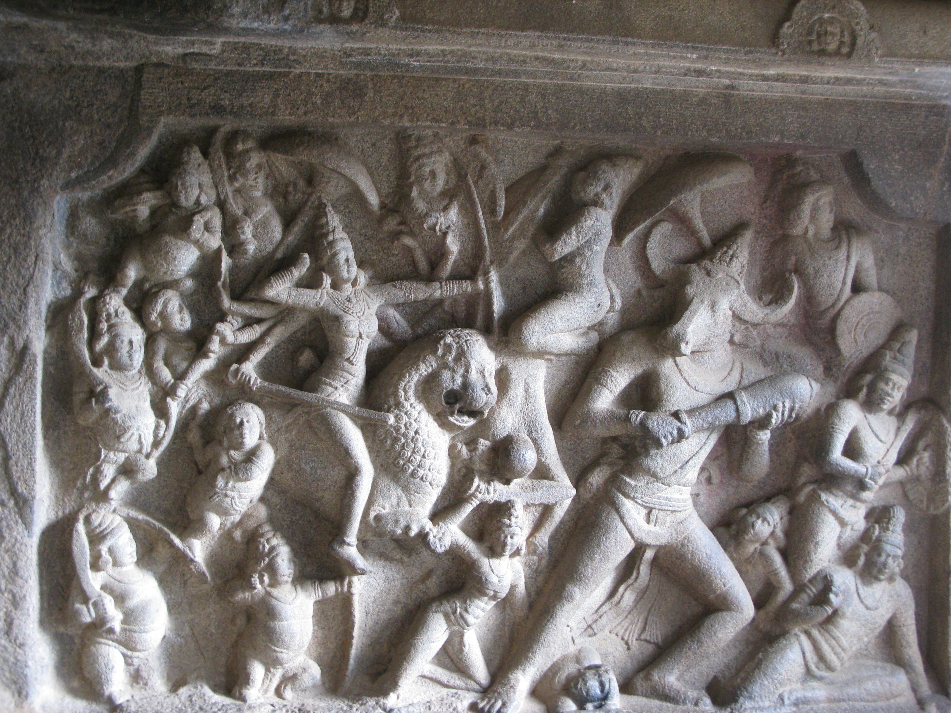 Mahabalipuram, Feb 2008